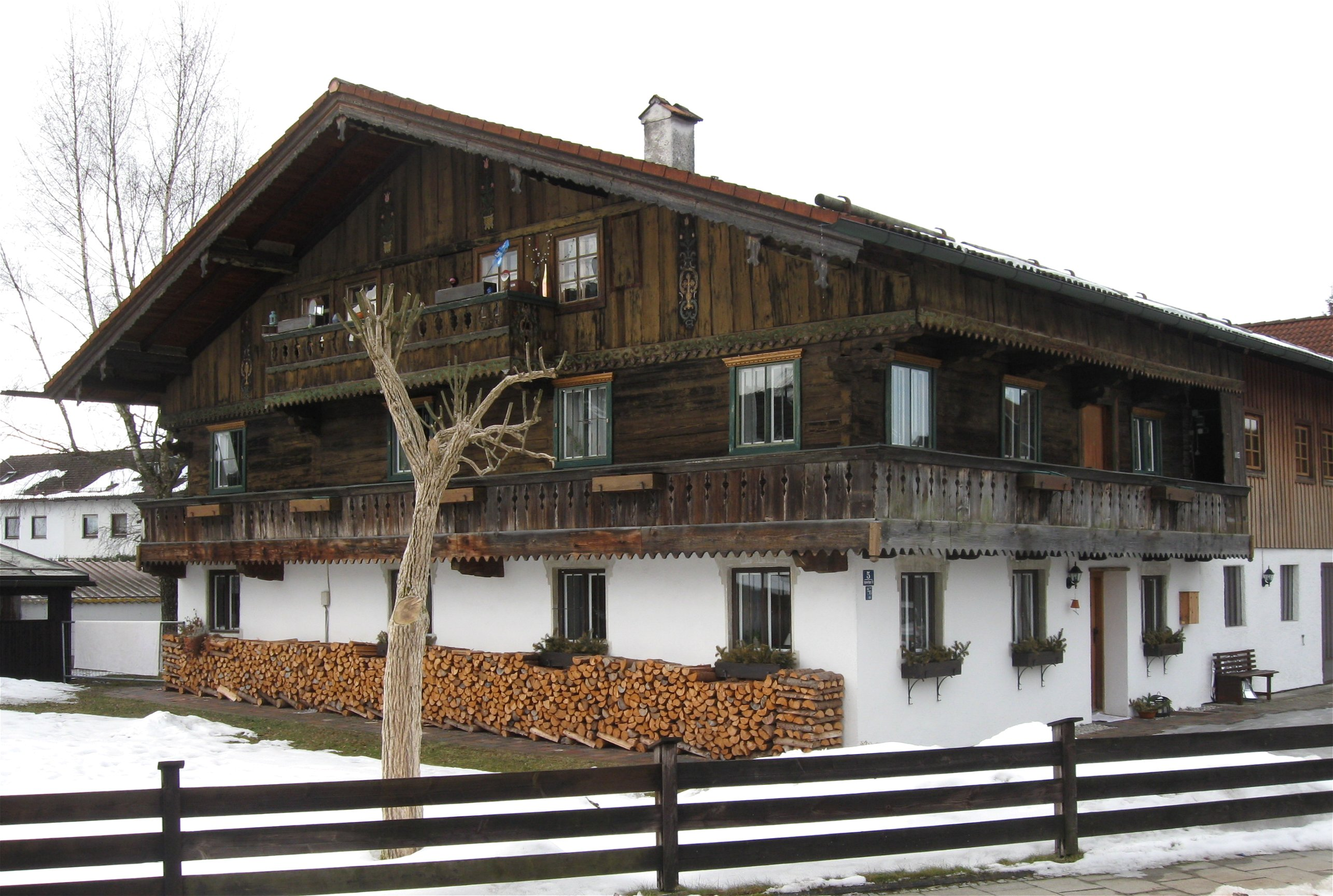 Englwartinger Straße 5; ehemaliges Bauernhaus (Beim Kurz, später Killer), Wohnteil mit Blockbau-Obergeschoss, bez. 1674, Veränderungen im 18. und 19./20. Jahrhundert. D-1-84-114-2